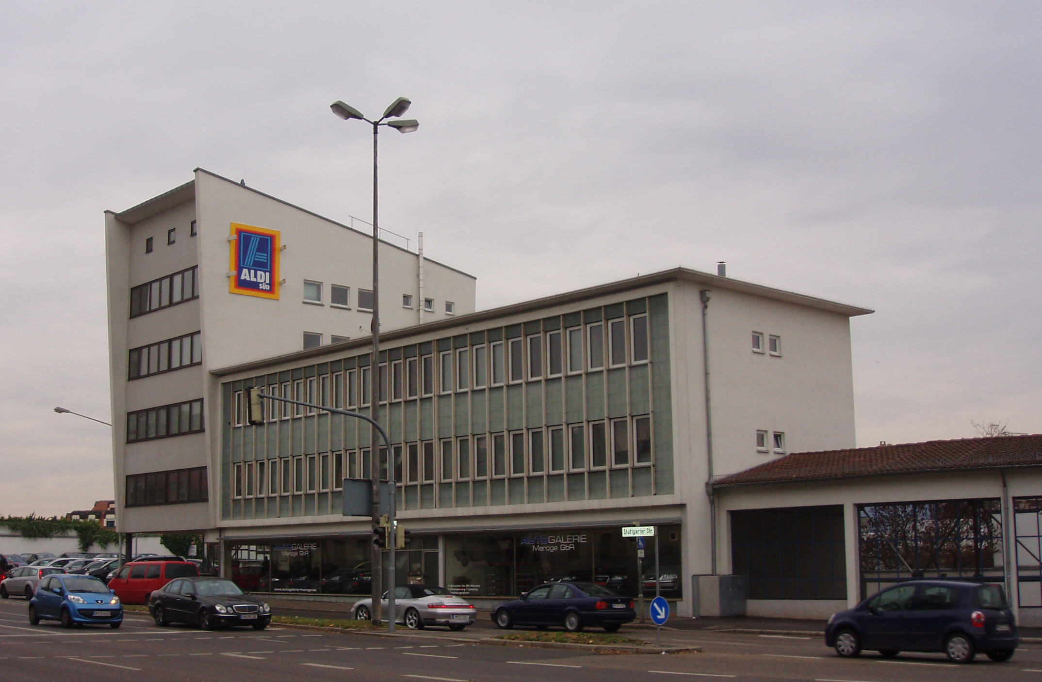 Ehemaliges Autohaus Assenheimer, Stuttgarter Straße 2, Heilbronn